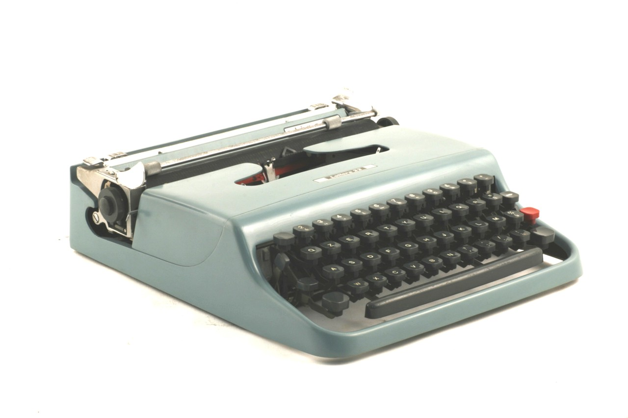 Macchina portatile con una struttura compatta. Il telaio è metallico, verniciato d'azzurro. Il lato posteriore è sagomato con righe verticali. La tastiera QZERTY presenta 43 tasti quadrati in plastica grigia, disposti su 4 file. Gli 86 caratteri sono montati sui martelletti riposanti nella cesta delle leve semicircolari. Una calotta asportabile copre la cesta delle leve e le due bobine portanastro. Il carrello è incastonato nel telaio della macchina senza nessuna sporgenza ad esclusione della manopola del rullo e della piccola leva per il movimento di ritorno sul lato sinistro. Nella parte posteriore del carrello sono imperniate due astine reggicarta a scomparsa. Modalità d'uso L'abbassamento di un tasto aziona il cinematico e il martelletto portacaratteri scatta, colpendo il punto di battitura da posizione frontale. Il tasto delle maiuscole comanda l'abbassamento della cesta delle leve. L'inchiostrazione avviene mediante nastro inchiostrato inserito in un sollevanastro. Attraverso un sistema di scappamento, il carrello portacarta compie uno spostamento ad ogni battuta di tasto, permettendo la composizione di una riga. La scrittura è pienamente visibile Notizie storico-critiche La Lettera 22 fu una delle macchine Olivetti di maggior successo. Come la di poco precedente Lexikon 80, la Lettera 22 fu tra le prime macchine per scrivere a combinare progettazione tecnica all'avanguardia con attenzione per il design. Dal punto di vista tecnico infatti la Lettera 22 raggiunse una estrema semplificazione del cinematico e dei meccanismi interni, tanto da ridurre il numero dei componenti a soli 240 pezzi. D'altro canto, le qualità artistiche della Lettera 22 vennero premiate nel 1954 col Compasso d'Oro e nel 1959 quando venne considerata dall'Illinois Technology Institute il miglior prodotto di design del secolo. Un modello di Lettera 22 è esposto inoltre nella collezione permanente del Museum of Modern Art di New York.